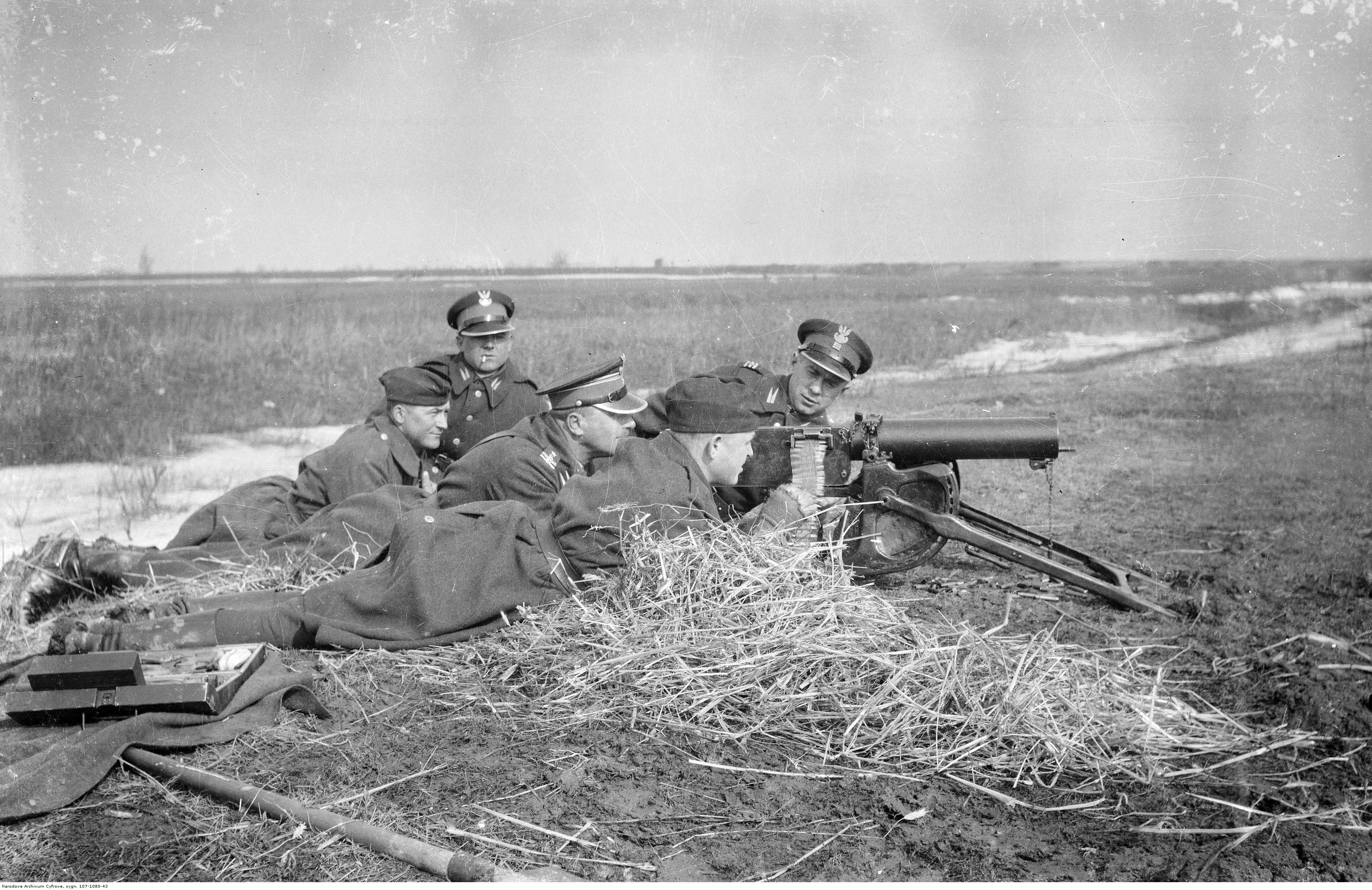 Szwoleżerowie z ciężkim karabinem maszynowym Maxim MG08 na stanowisku strzeleckim.